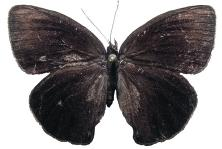 Calisto bruneri